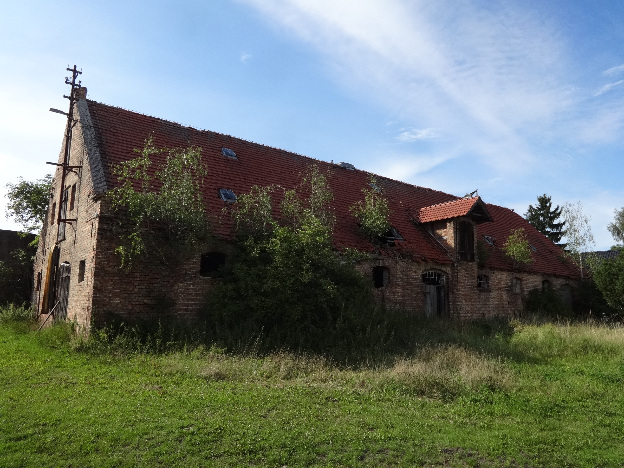 Nonnendorf, ein Ortsteil der Gemeinde Rubenow in Mecklenburg-Vorpommern